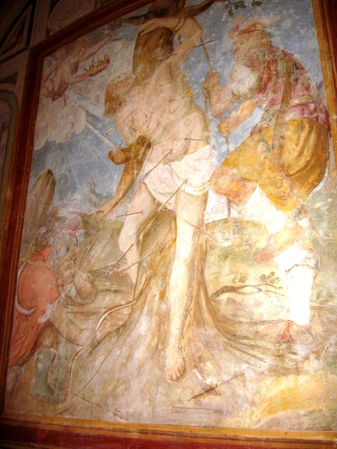 Pezzolo Valle Uzzone. Cappella rurale di san Sebastiano a Gorrino. Dipinto della parete di fondo.